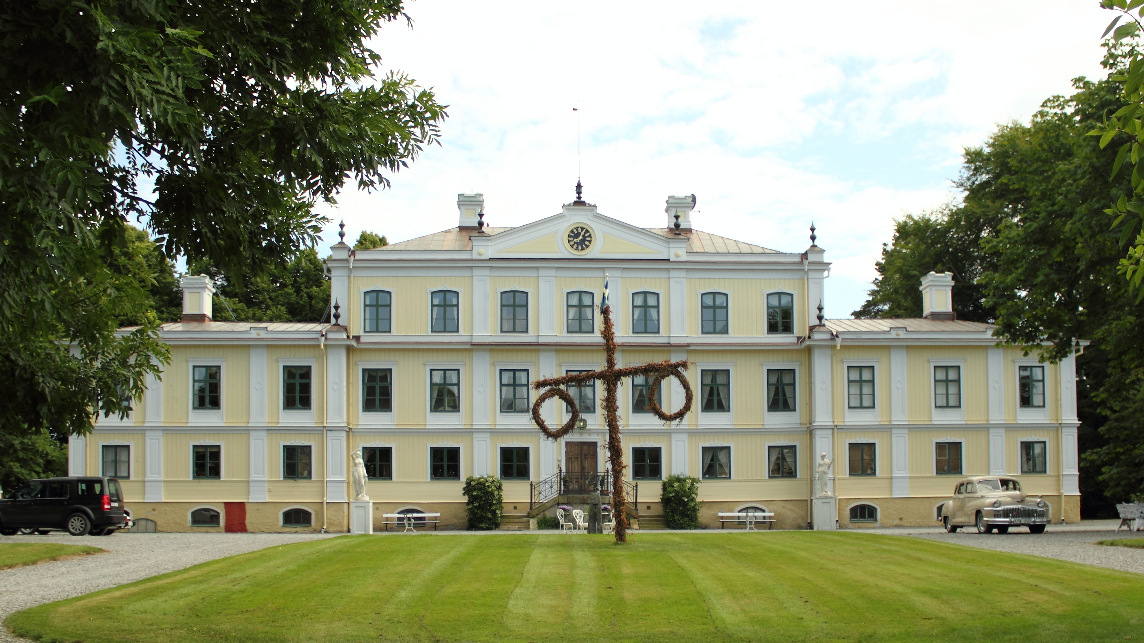 Dylta bruksherrgård.